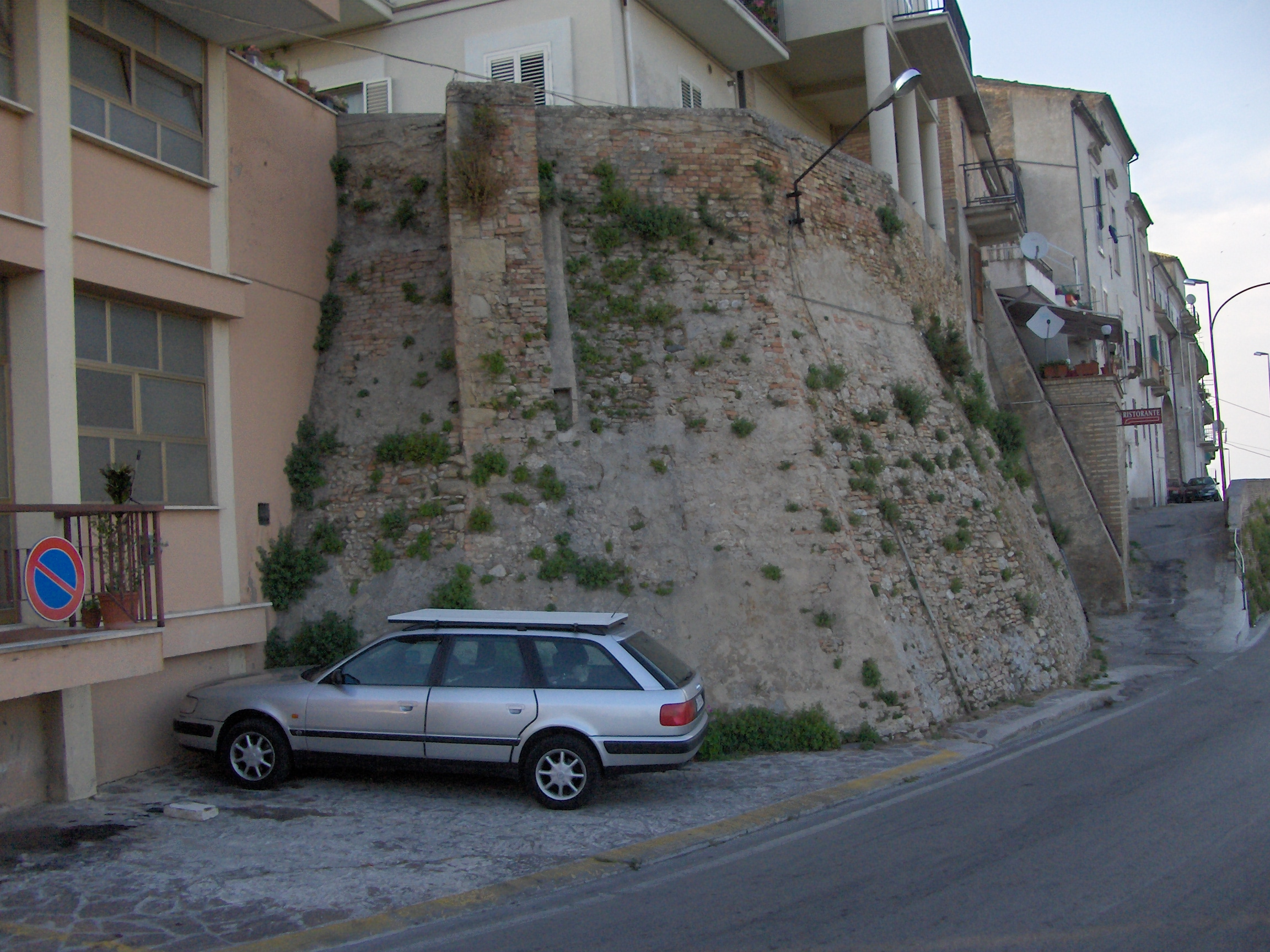 I resti delle mura dell'antico castello di San Vito Chietino, che oggi circoscrivono la zona del centro storico.